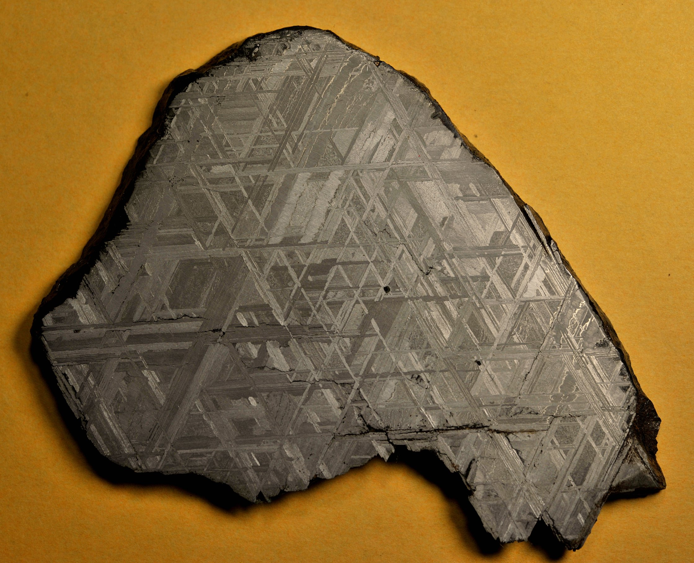 Muonionalusta meteorite, full slice (across 9.6cm).